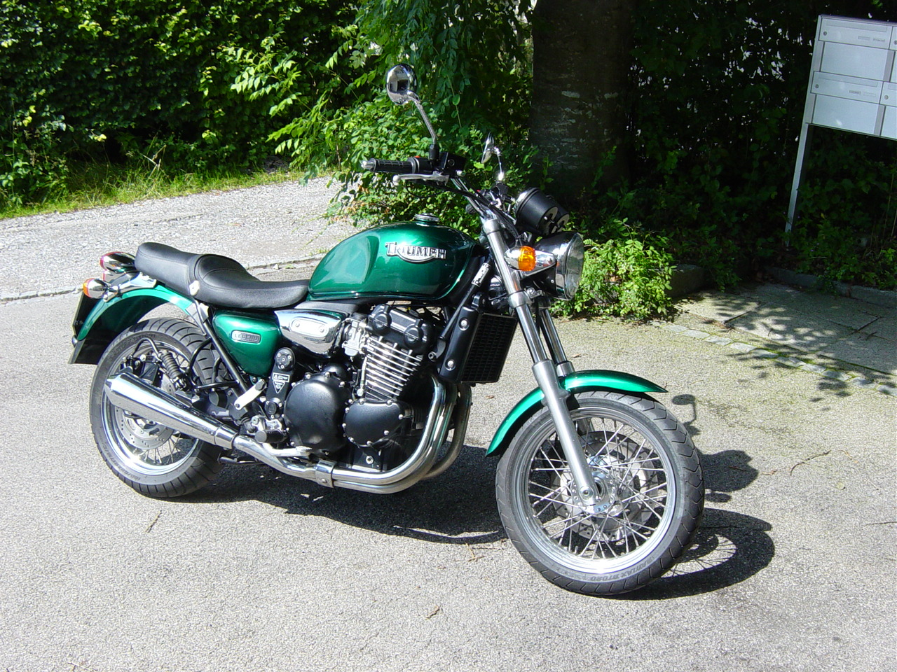 Triumph Legend TT 900